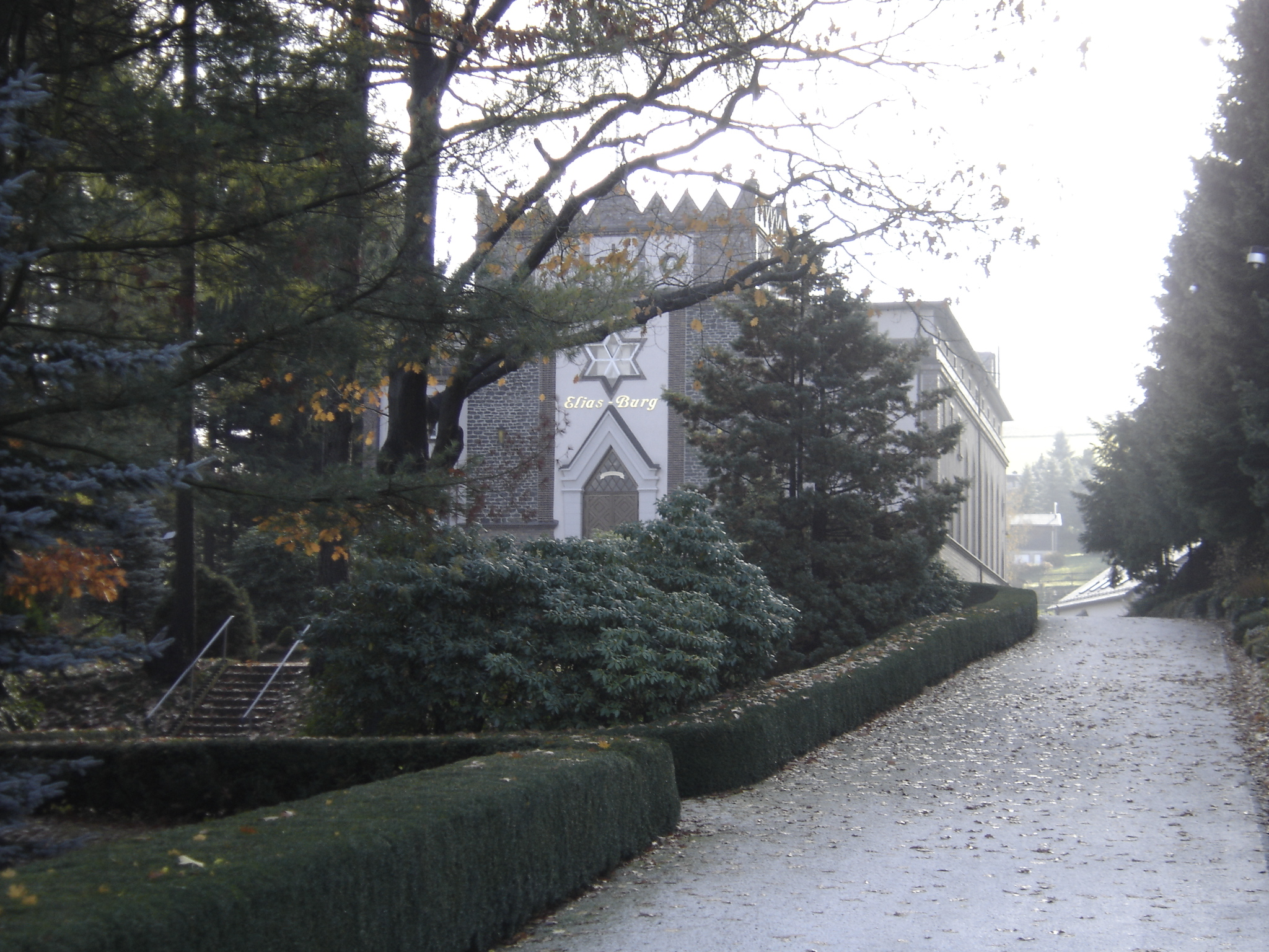 Eliasburg von vorne